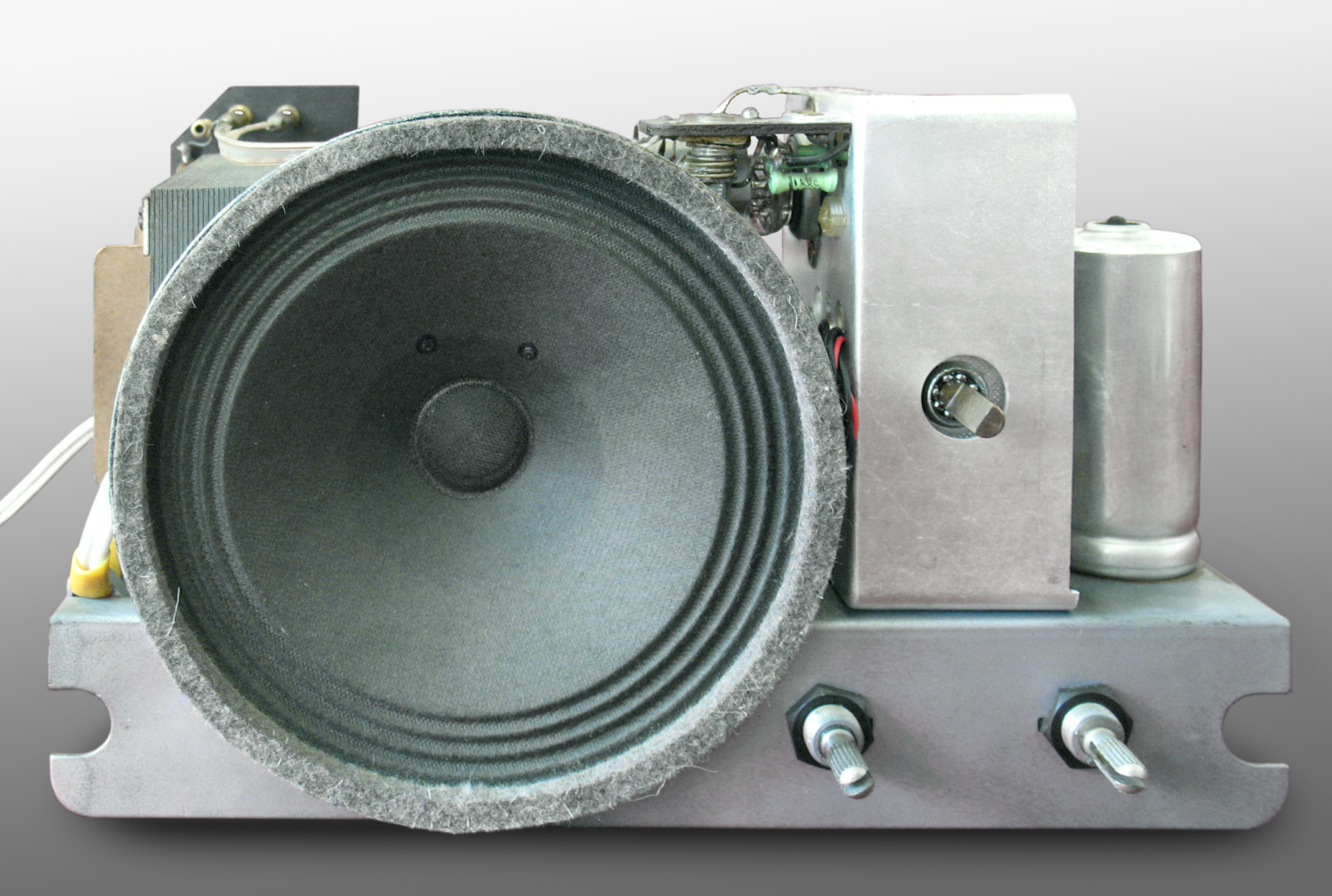 Radiochassis des Braun Röhrenradios SK 1